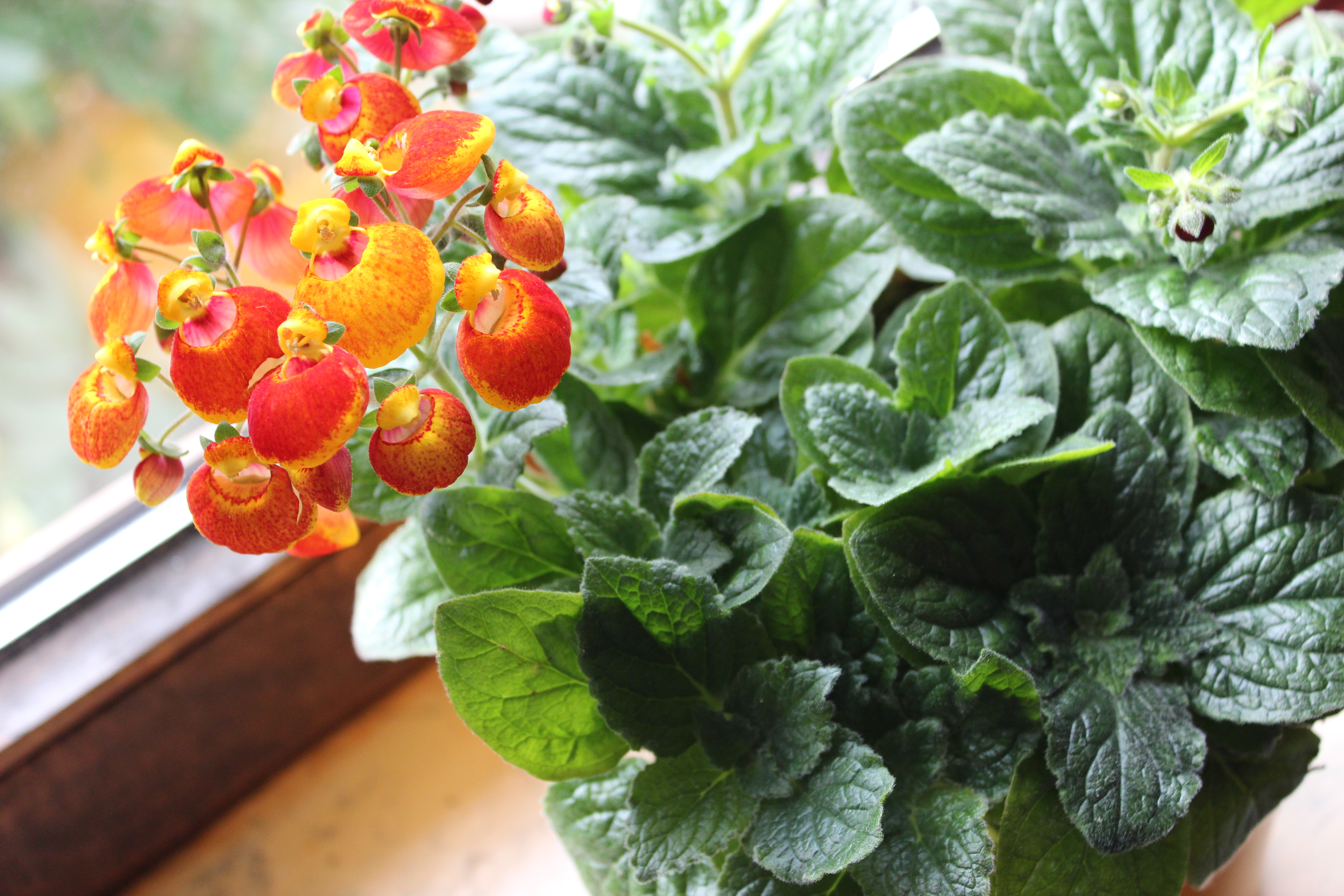 Zimmer-Pantoffelblume (Calceolaria herbeohybrida)